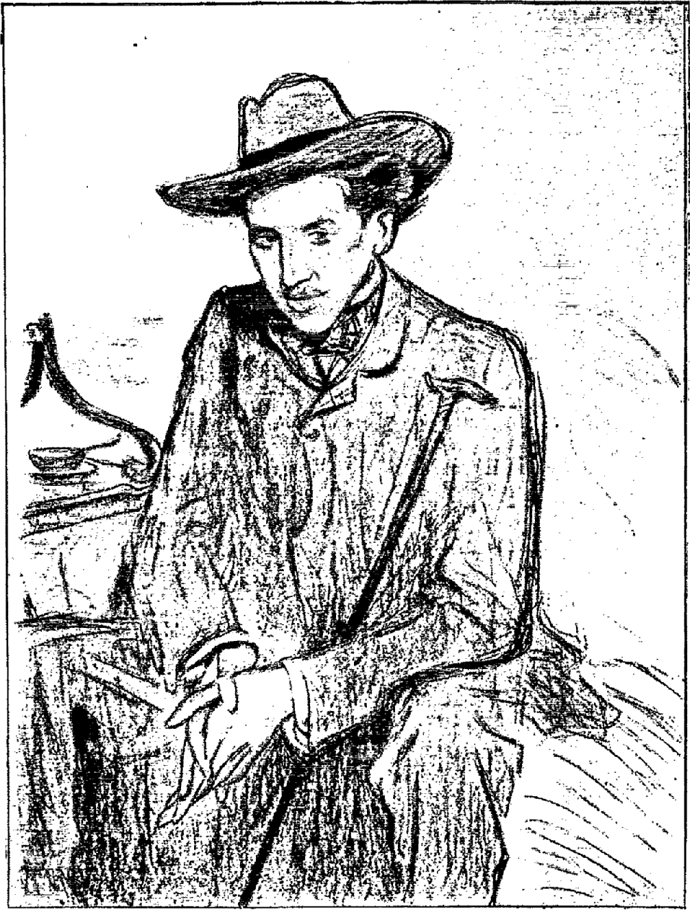 portrait de Jean de Tinan